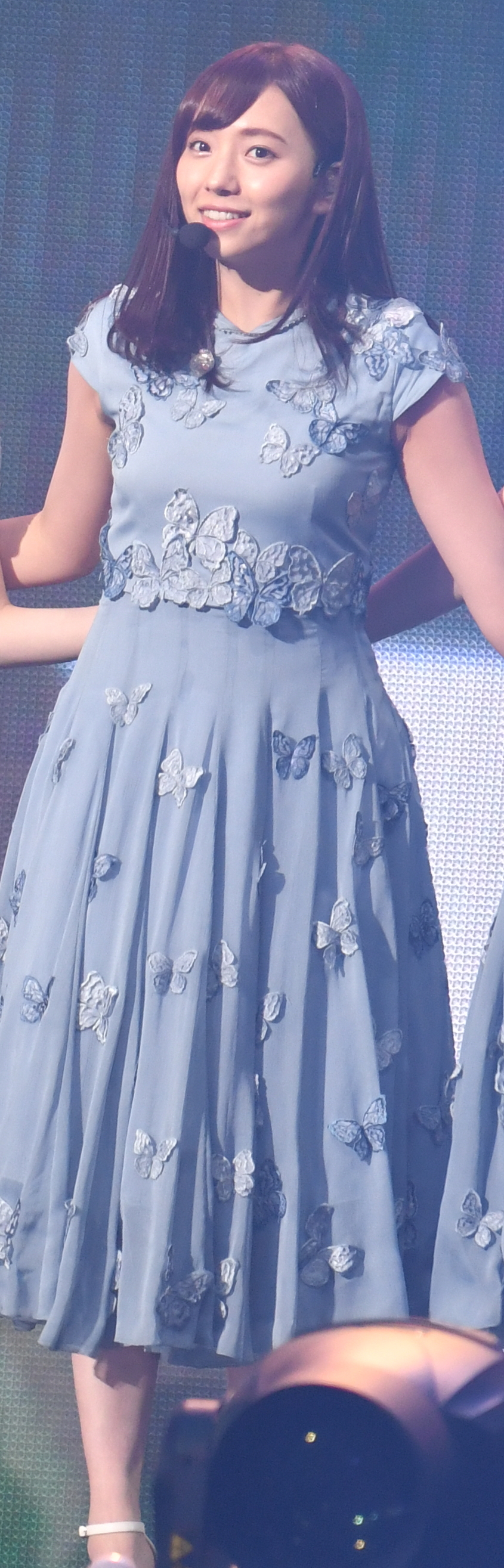 2019.01.26「第14回 KKBOX MUSIC AWARDS in Taiwan」乃木坂46 @台北小巨蛋